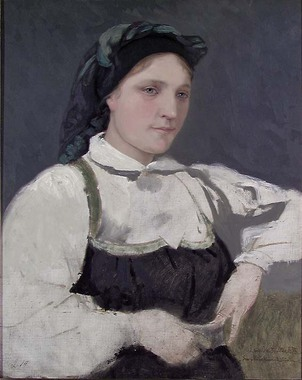 Norwegian: Ung pike i Setesdalsbunad.Young Woman in Costume from Setesdaltitle QS:P1476,no:"Ung pike i Setesdalsbunad." label QS:Lno,"Ung pike i Setesdalsbunad."